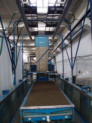 Dešťový simulátor FSV ČVUT